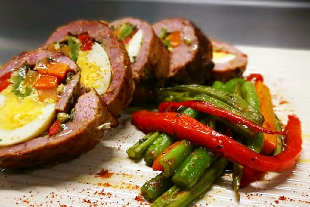 Versión jpg del archivo Archivo:Lomo relleno.png